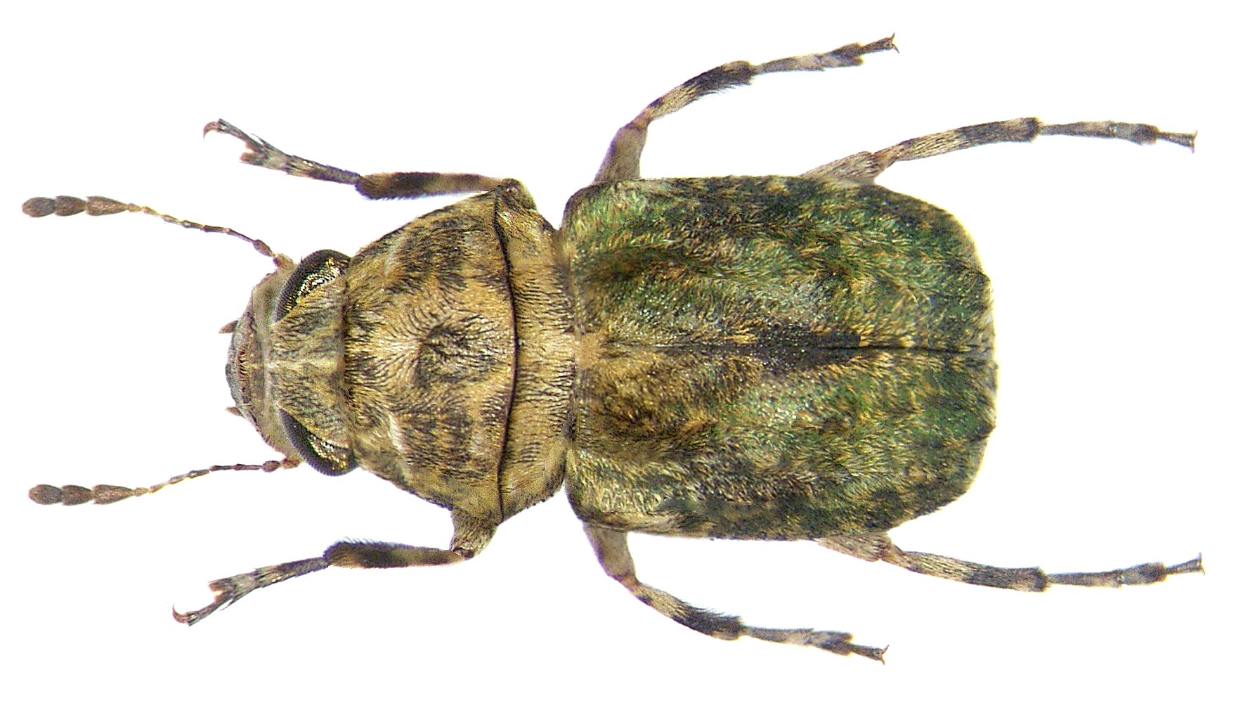 Familie: Anthribidae Groesse: 4 mm Fundort: Indonesien, Sulawesi, Toraut leg. A.Skale, 2006; det. Frieser, 2006 Photo: U.Schmidt, 2006